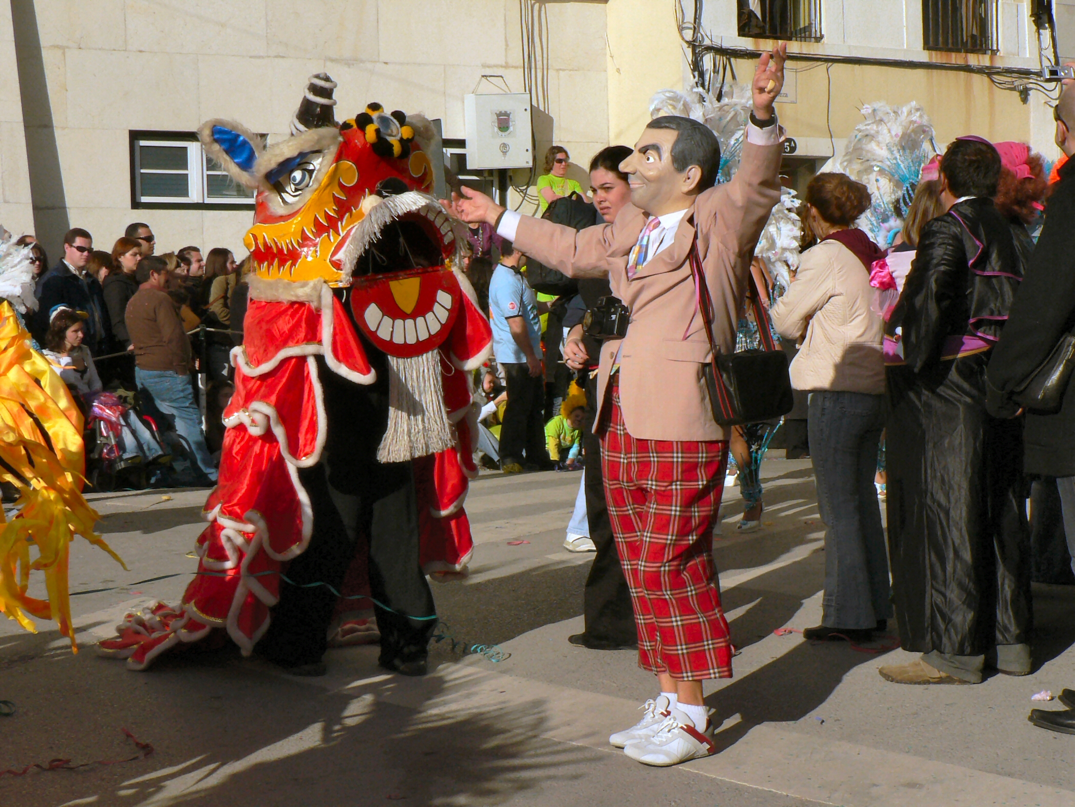 Desfile de Carnaval em Sesimbra 2007